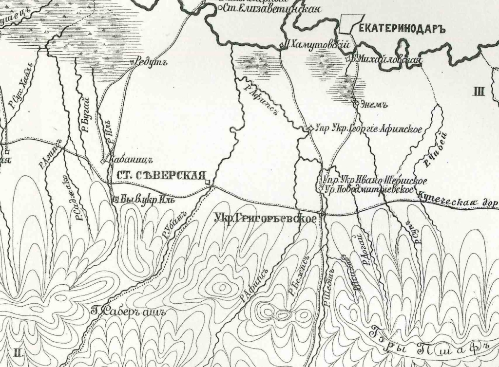 Историческая карта Северского района